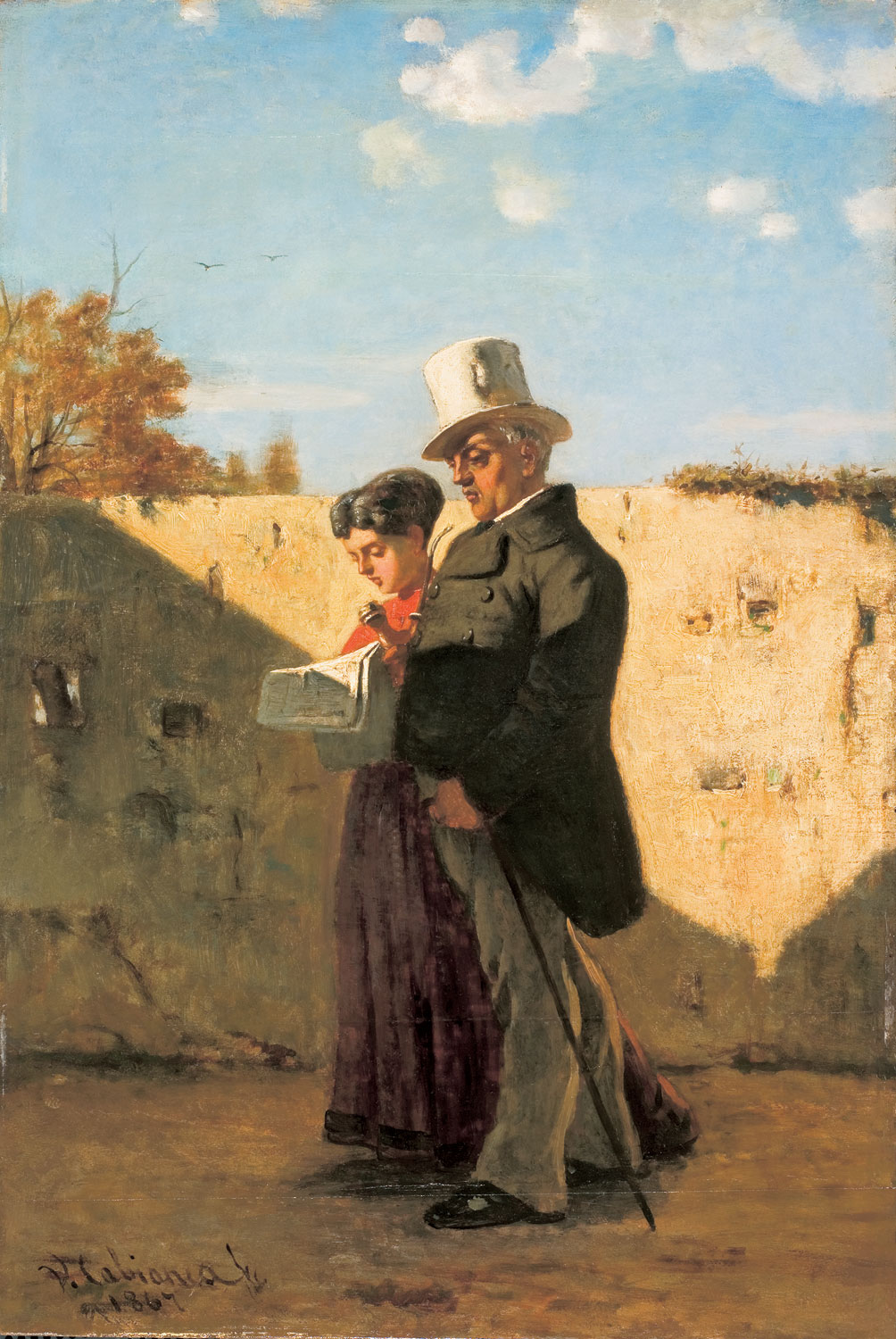 La passeggiata (Il padre e la sorella del pittore)